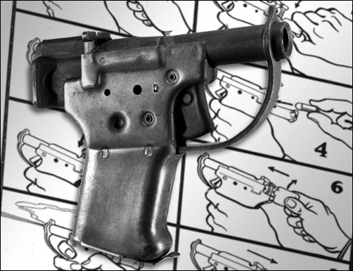 1943 im Auftrag des britischen Geheimdienstes produzierte "Liberator"-Pistole